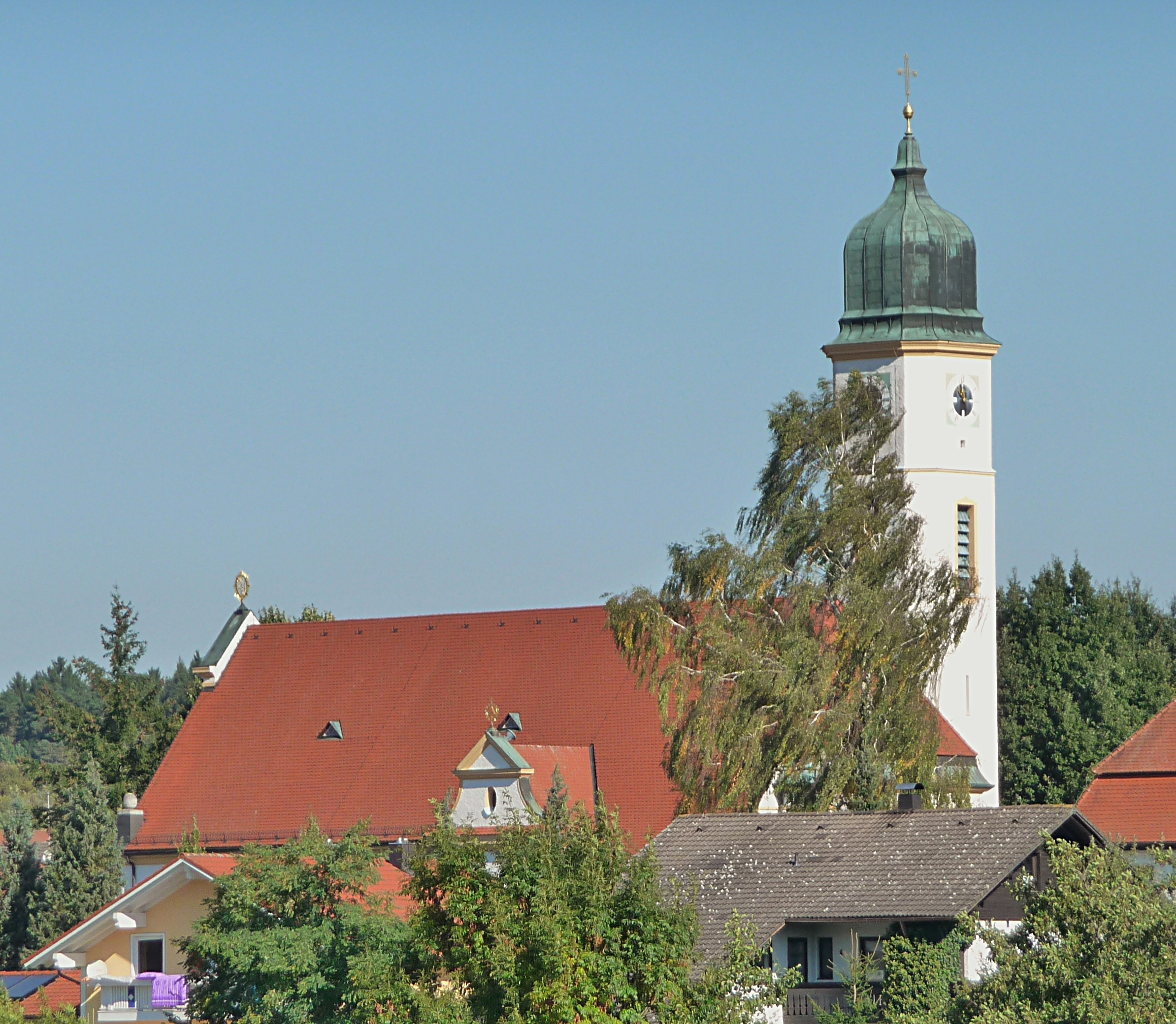 Die Pfarrkirche St. Maria, Patrona Bavariae in Ulbering